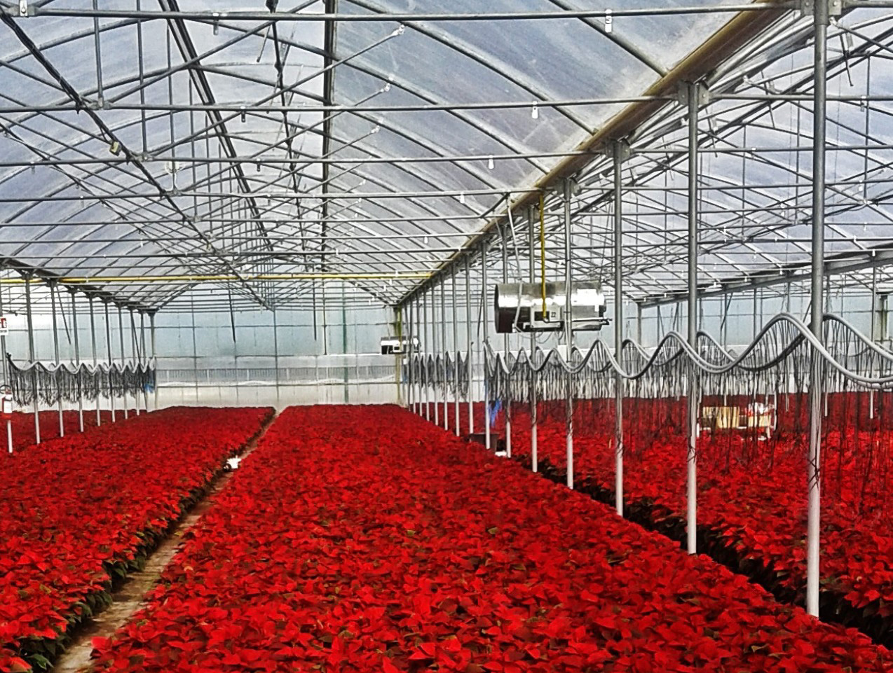 Mobil kertészeti Kispamacs hőlégfúvó, felfüggeszthető az üvegházak, vagy fóliasátrak vázára. Automata vezérlésének köszönhetően termosztáttal lehet üzemeltetni. Így mindig megfelelő hőmérséklet van a virágokra, vagy a zöldségfélékre a leg hidegebb időben is.